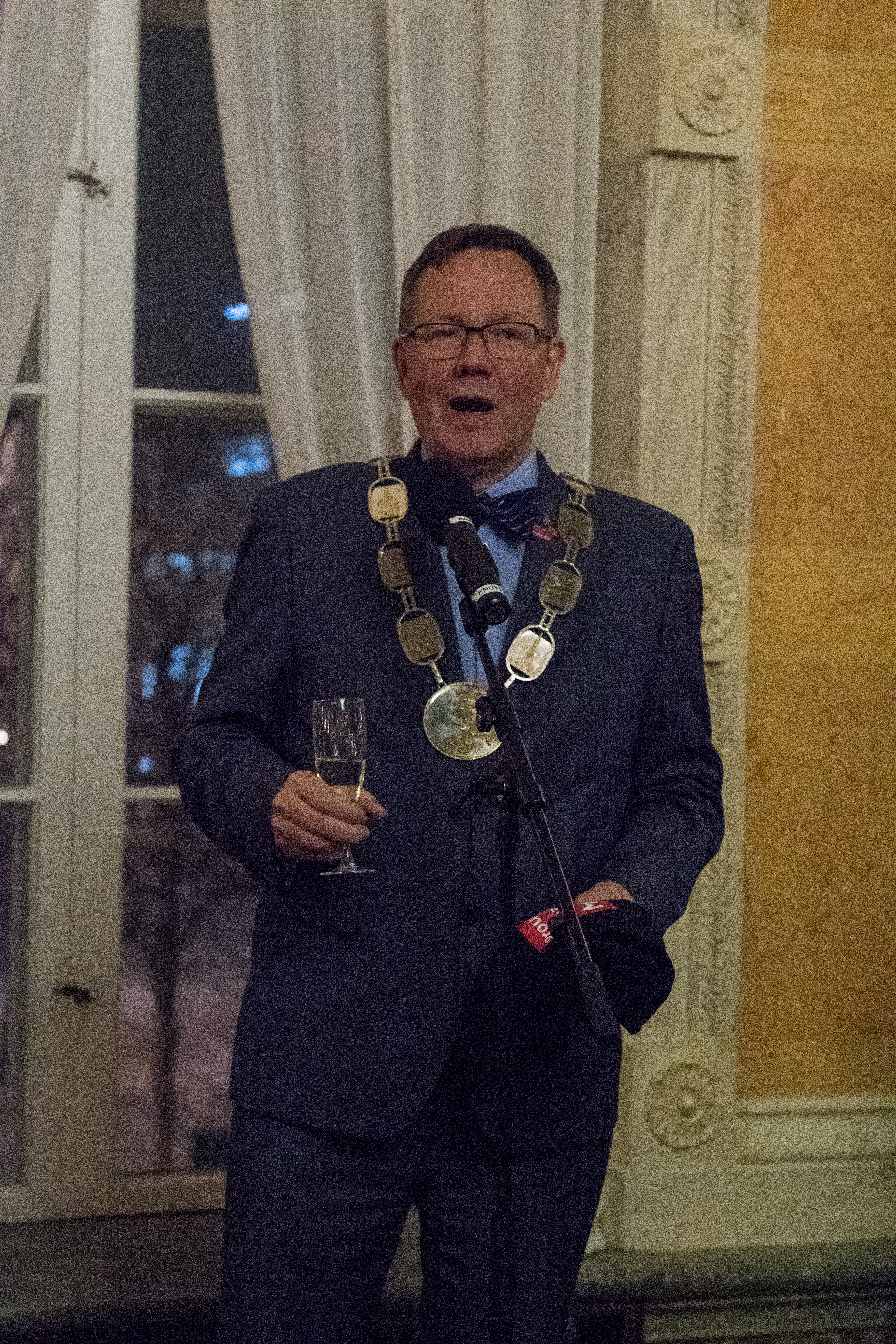 Kent Andersson håller välkomsttal på välkommstfesten under torsdagen innan Melodifestivalen i Malmö 2018.Välkommsttal.